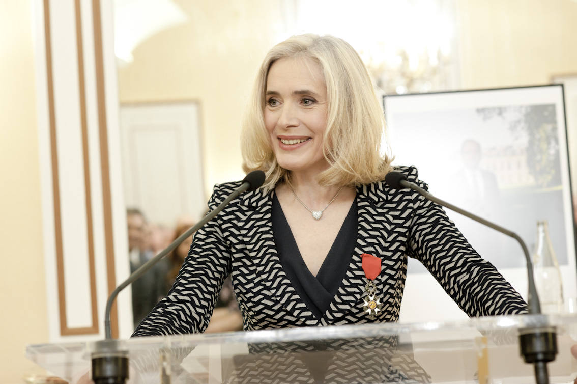 Remise de légion d'honneur